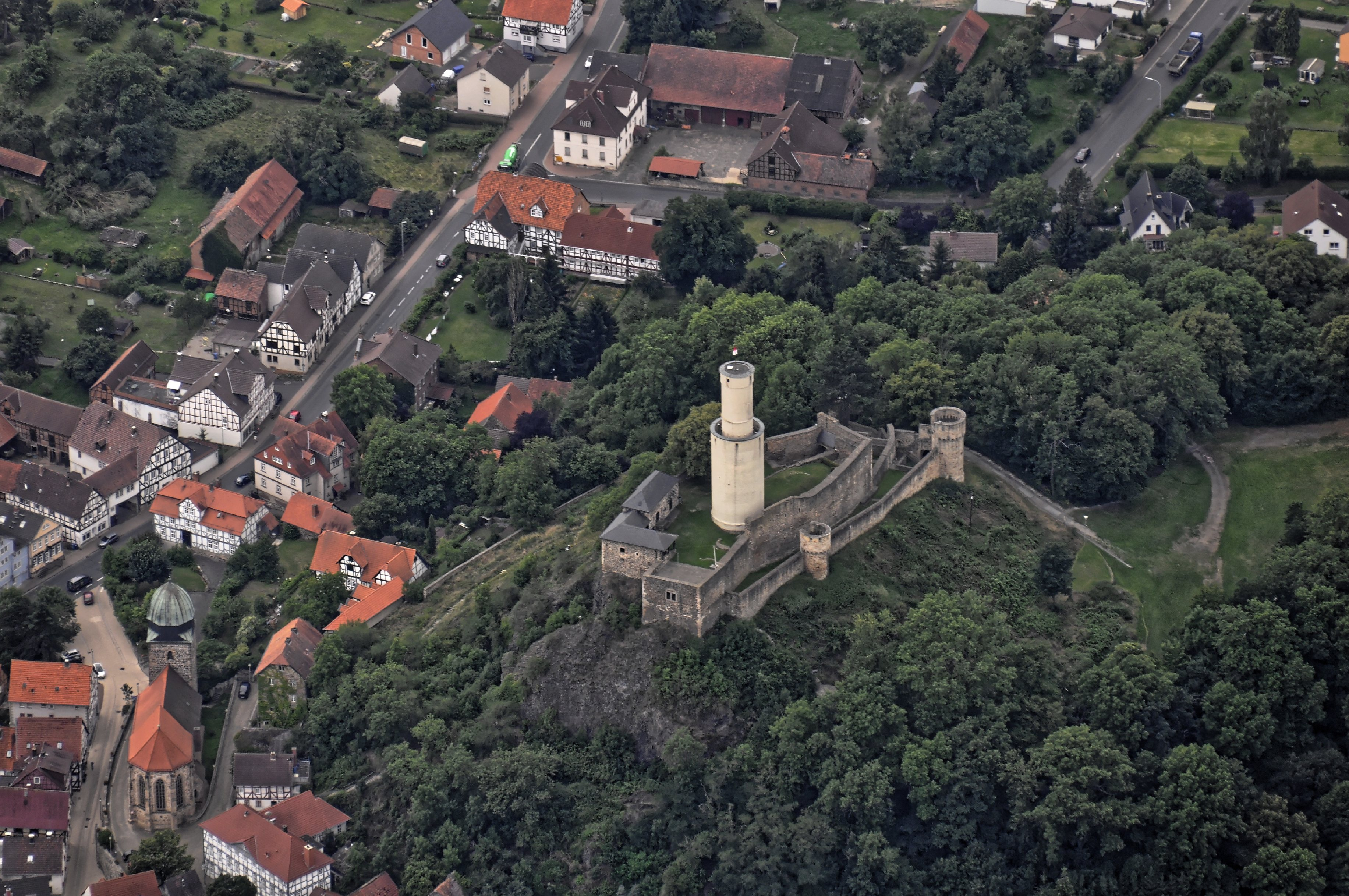 Bilder vom Flug Nordholz-Hammelburg 2015: Die Burgruine Felsburg in Felsberg, Schwalm-Eder-Kreis, Hessen.